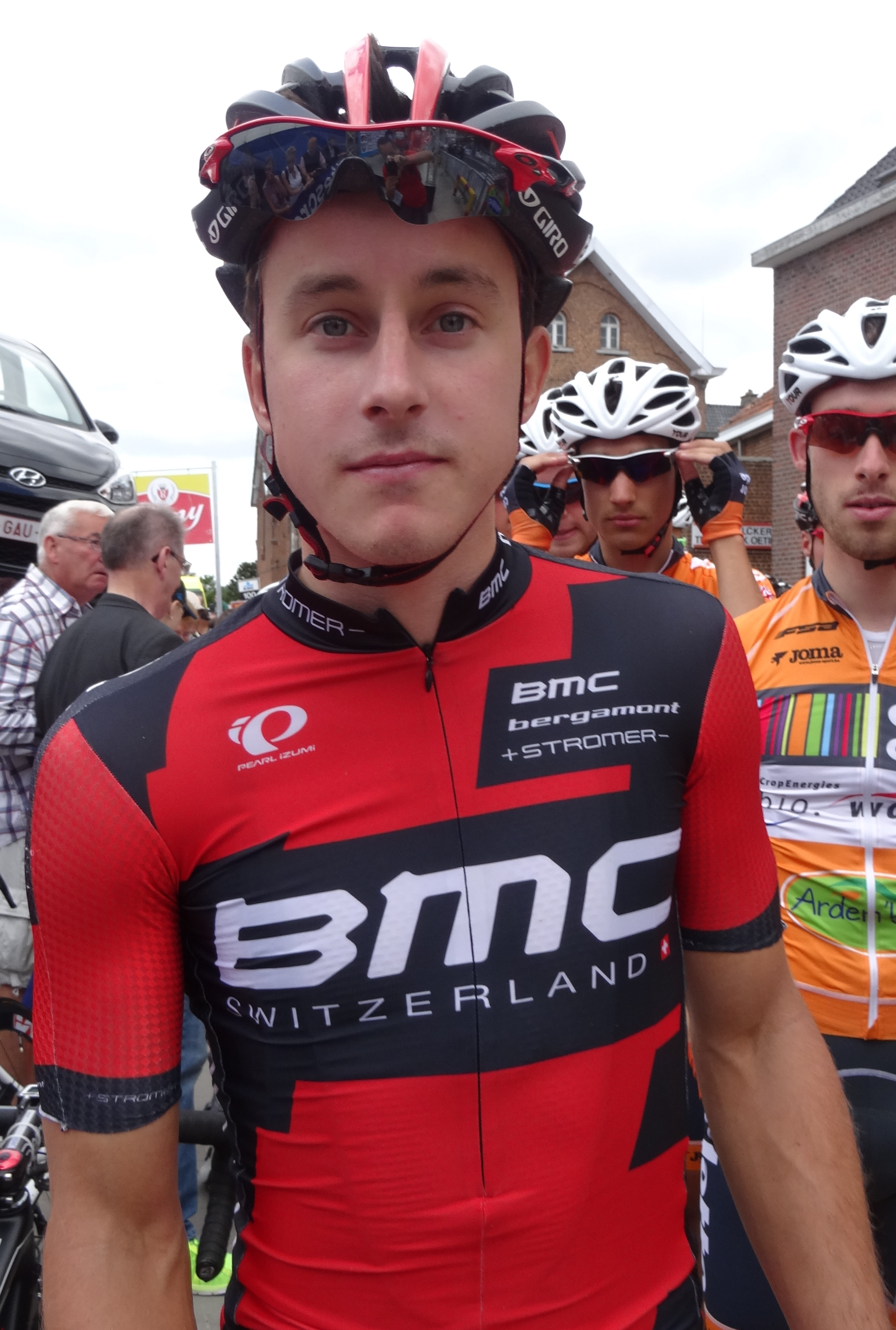 Reportage photographique réalisé le mercredi 25 juin à l'occasion du départ et de l'arrivée de l'Internationale Wielertrofee Jong Maar Moedig 2014 à Oetingen (Gooik), Belgique.